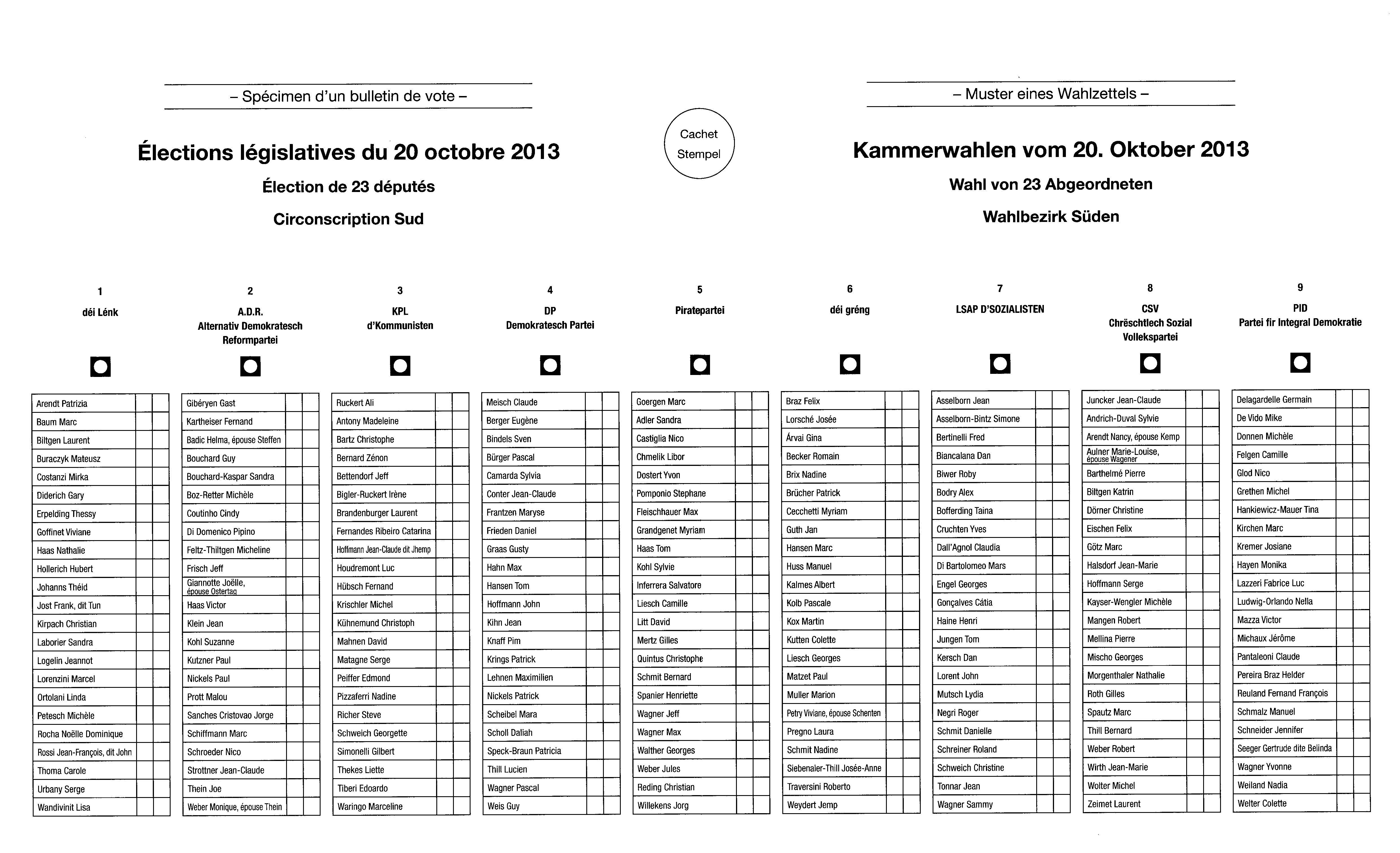 Muster eines Stimmzettel für die Kammerwahl 2013, Wahlbezirk Süden